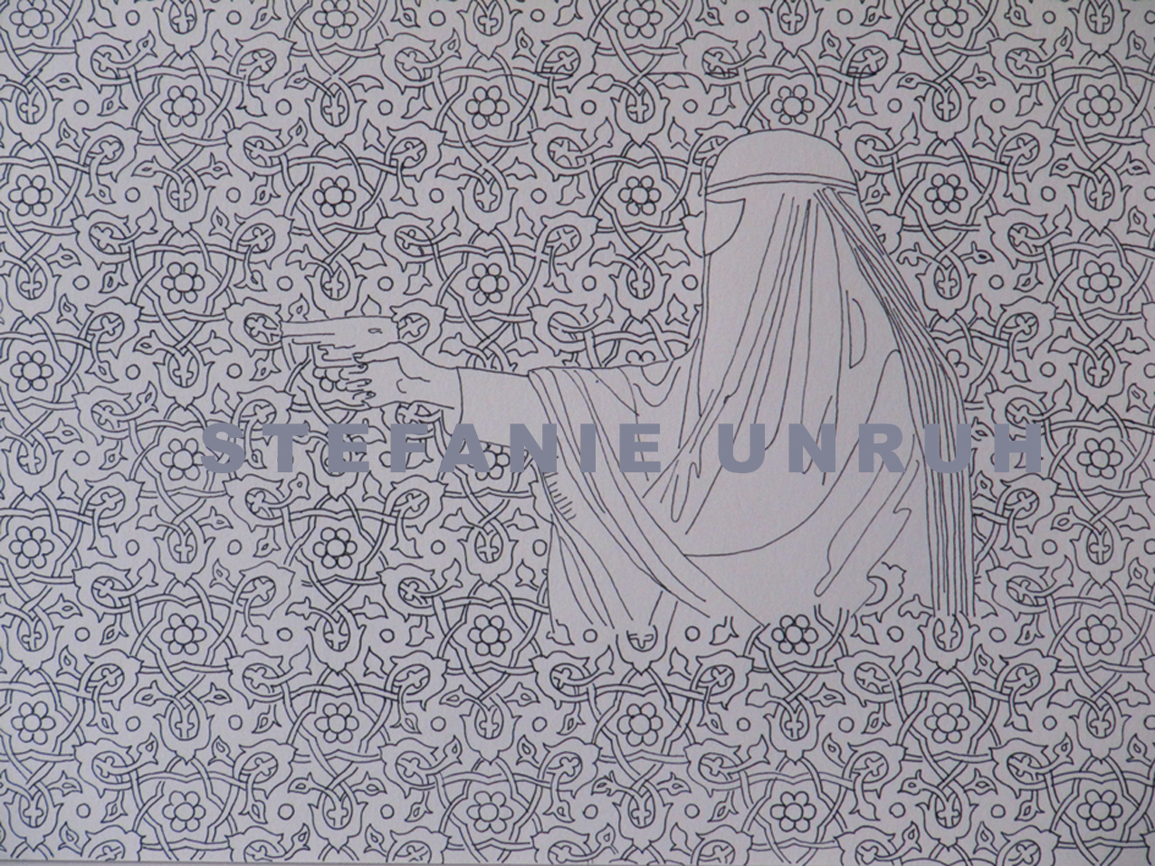 Ornamentale Blumenmuster, die an Arabesken islamischer Kunst erinnern, mit Faltenwürfen von Burka tragenden Frauen.